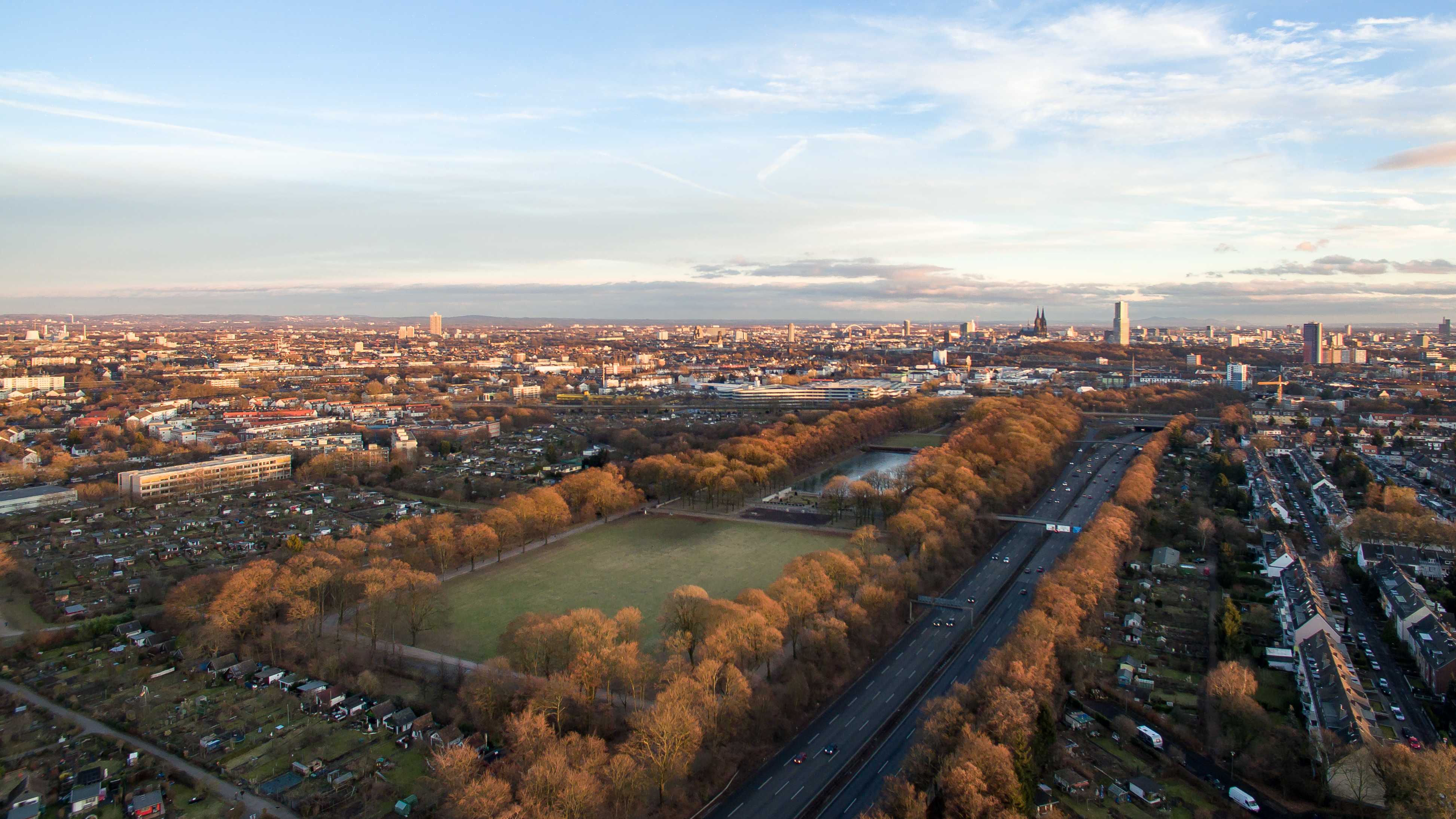 Blücherpark in Köln-Bilderstöckchen, Luftaufnahme